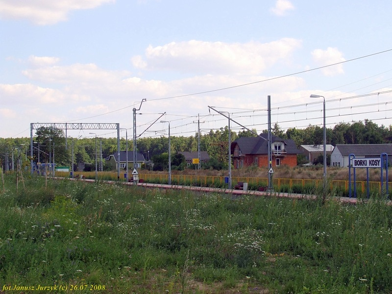 Przystanek kolejowy w Borkach Kosach.